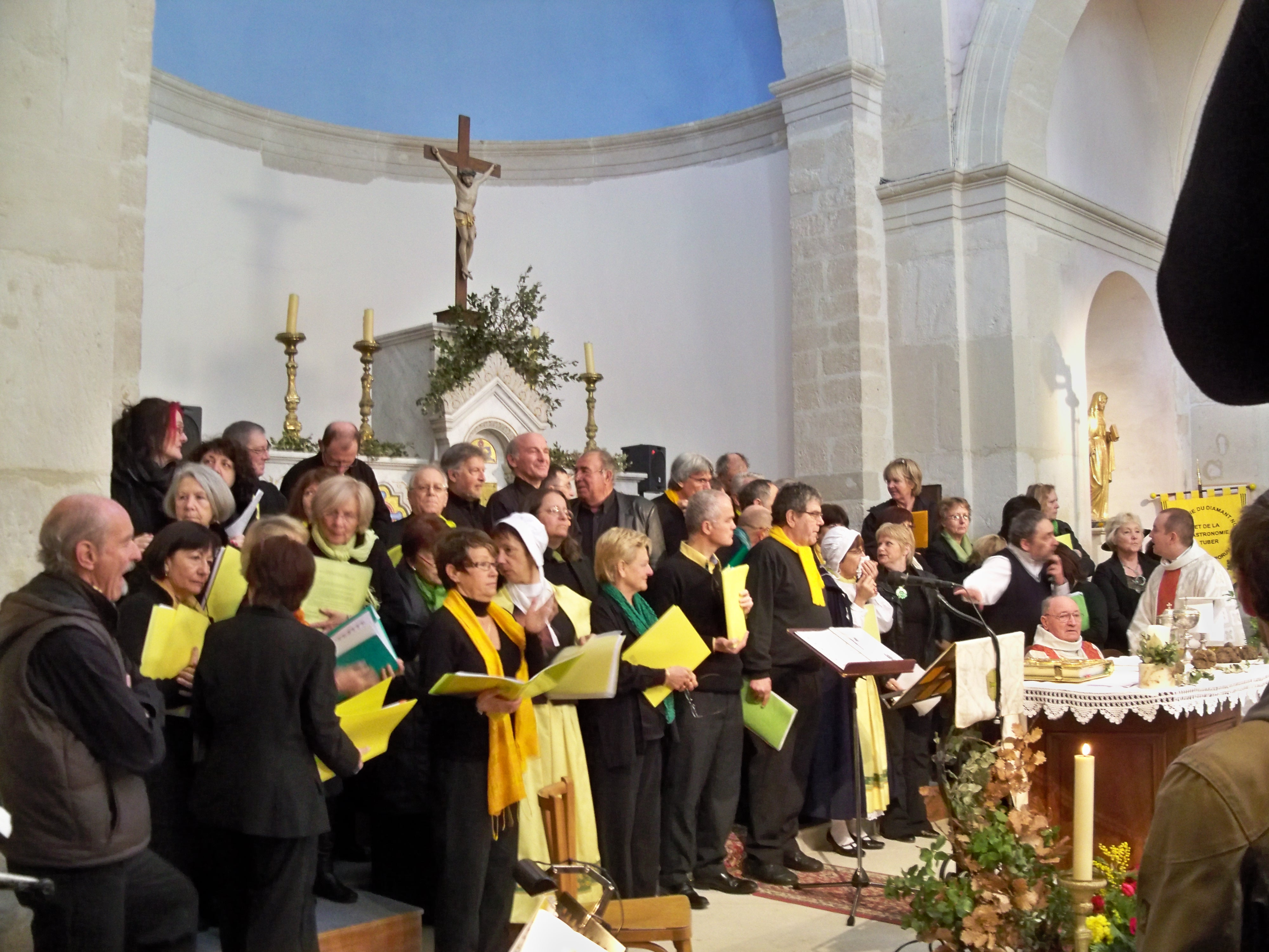 Messe aux truffes de Richerenches, Vaucluse, France